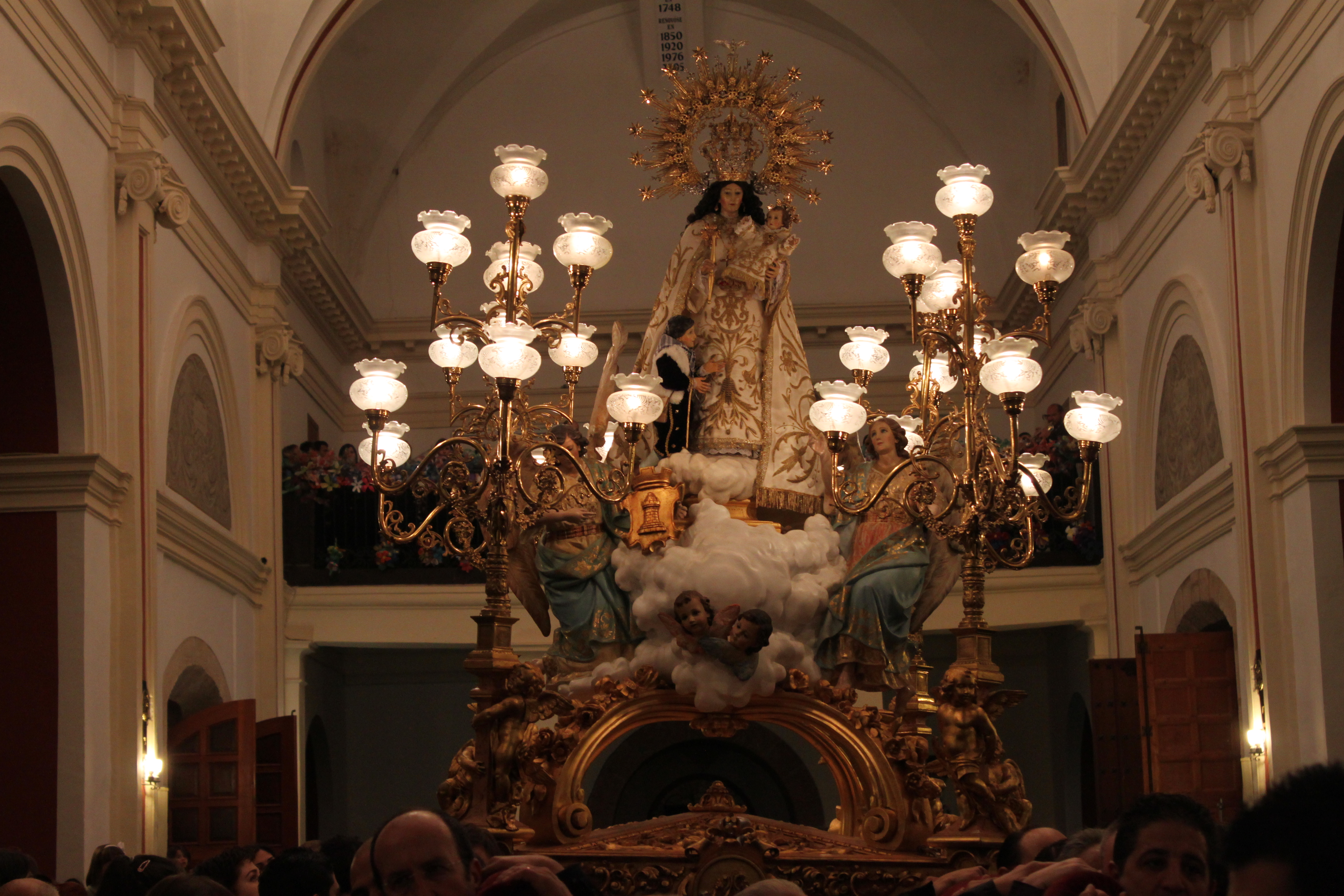 La Virgen de la Cabeza atraviesa la iglesia